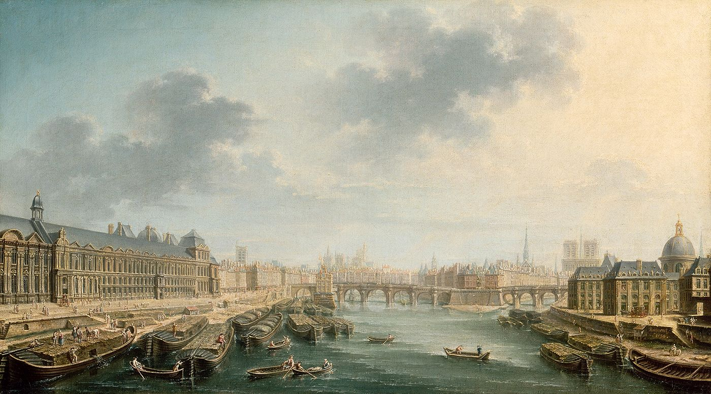 Huile sur toile Hauteur : 46 cm Largeur : 85 cm Musée du Louvre (n° d'inventaire : RF1971-12)